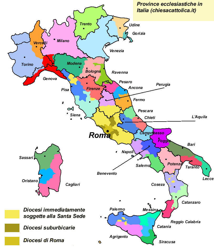 Precisazione dei casi particolari (imm. sogg., suburbicarie)